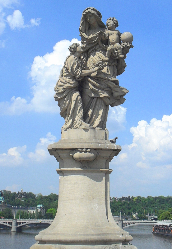 Karlův most, Staré Město a Malá Strana, mezi Křižovnickým náměstím a Mosteckou